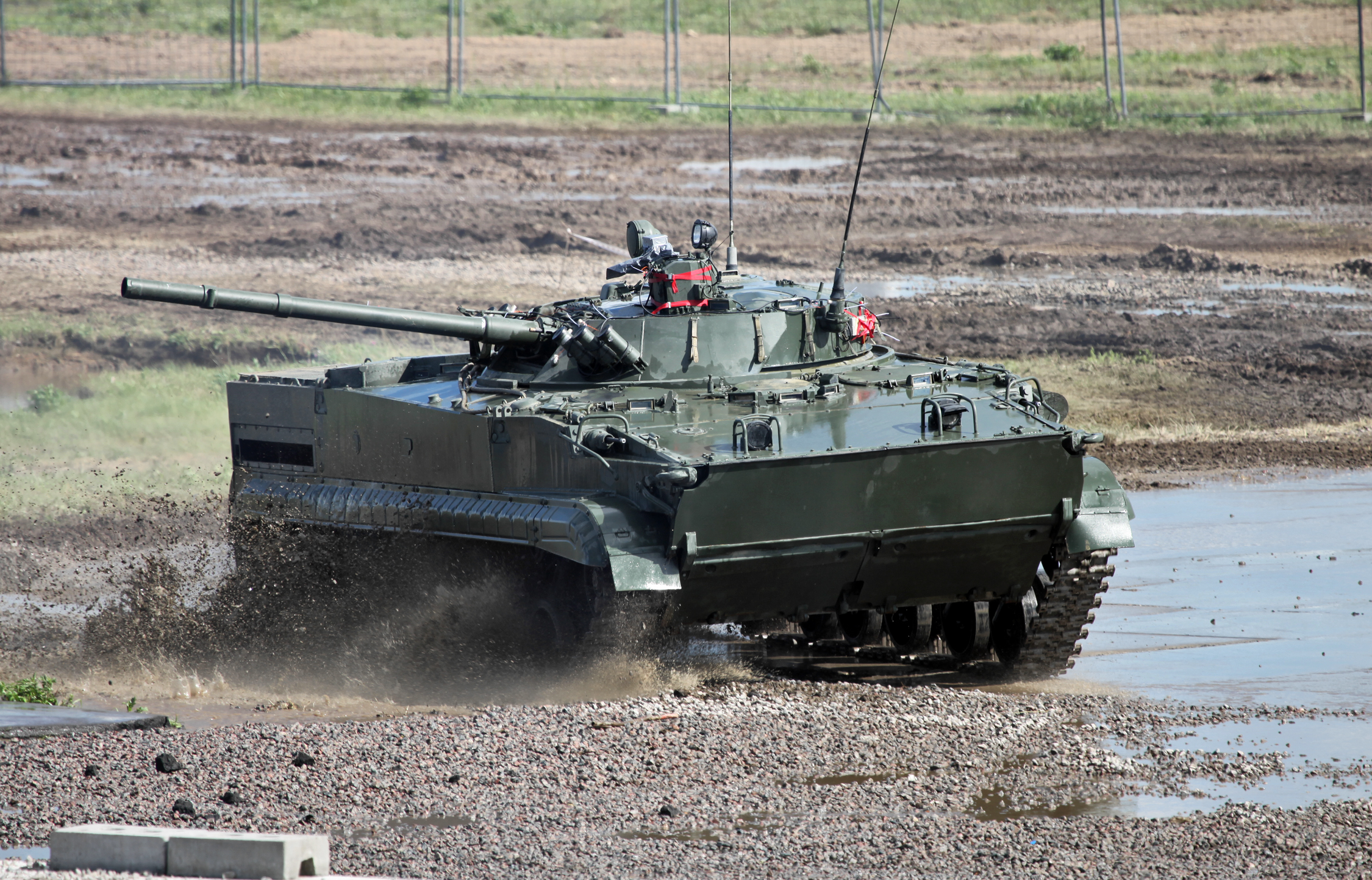 БМП-3 (BMP-3 IFV)